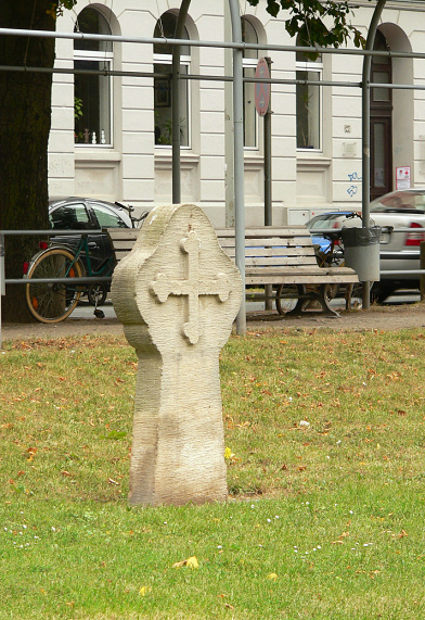 Weissekreuzstein Hannover Weisekreuzplatz